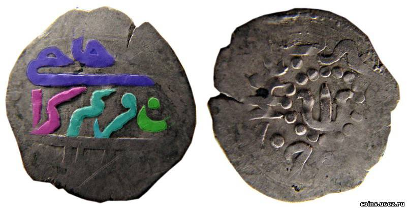 легенда акче Хаджі II Герая